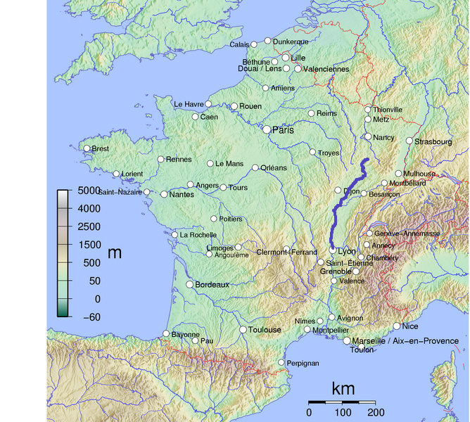 Kaart van de Saône gebaseerd op Wikimedia Commons kaart van frankrijk (File:France cities.png). Orgineel door David Monniaux. Bewerking door Boerkevitz